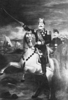 Obra da coleção Brasiliana Iconográfica.